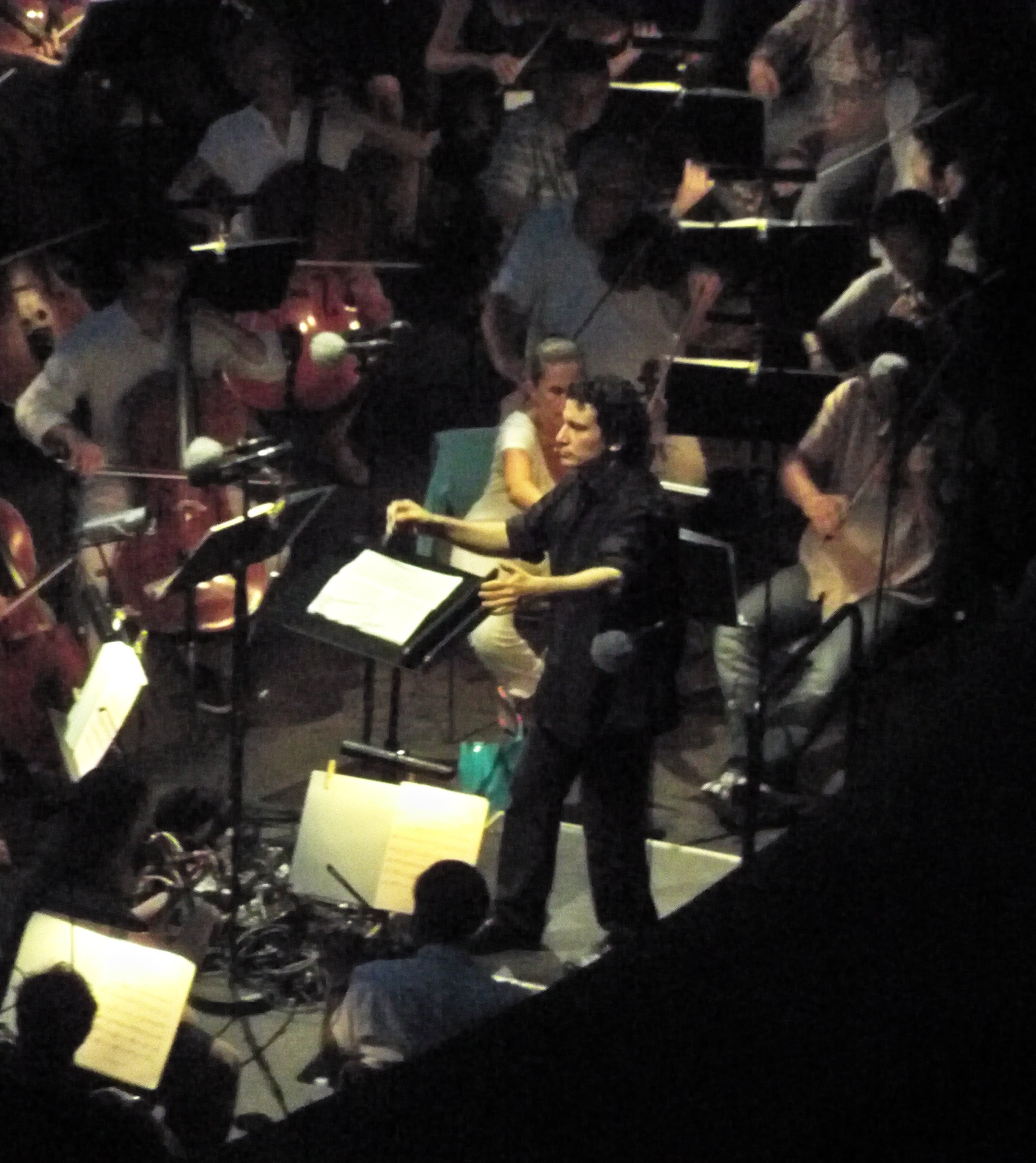 Chorégies d'Orange 2013 : Générale de Un Ballo in Maschera|Un Ballo in Maschera - Alain Altinoglu